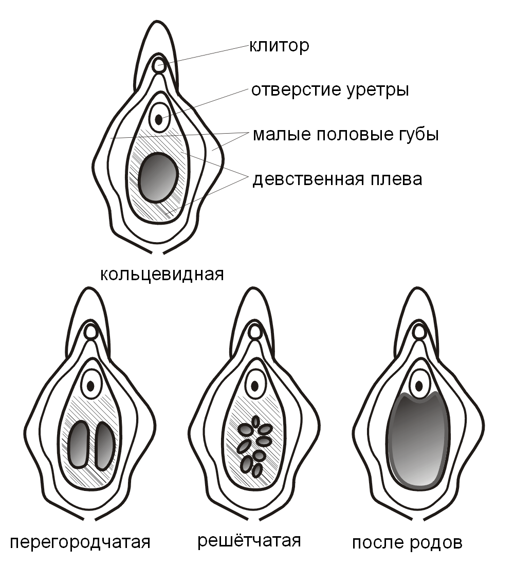 Типы девственных плев